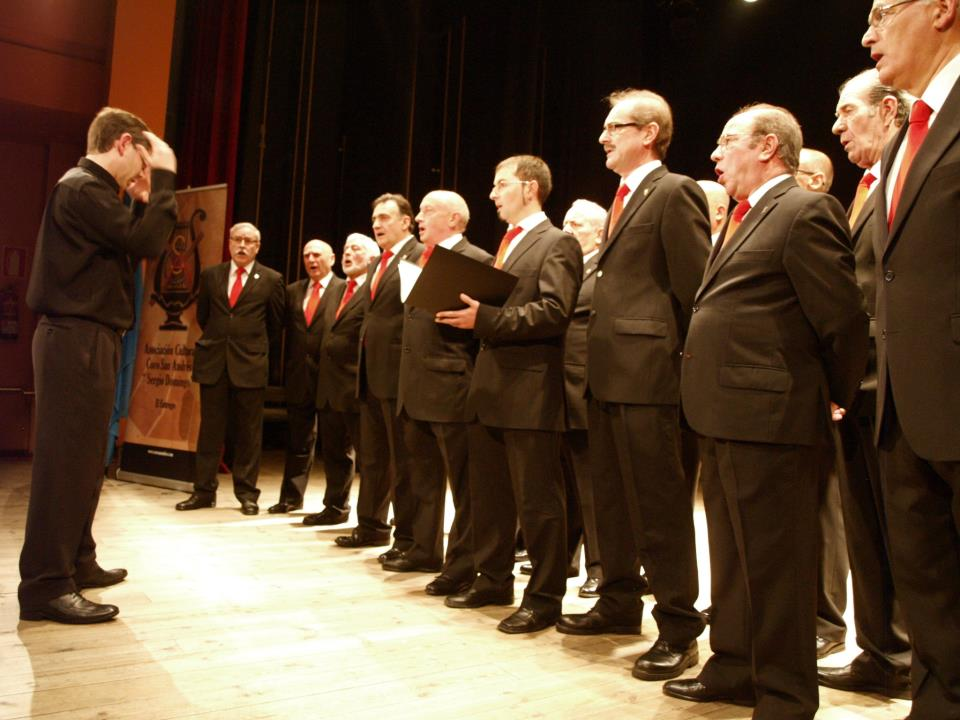 Coru San Andrés "Sergio Domingo"